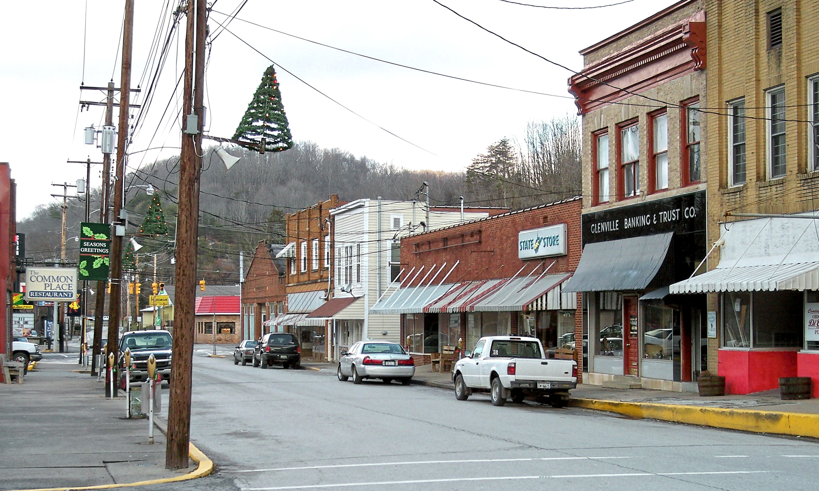 Main Street in Glenville, West Virginia